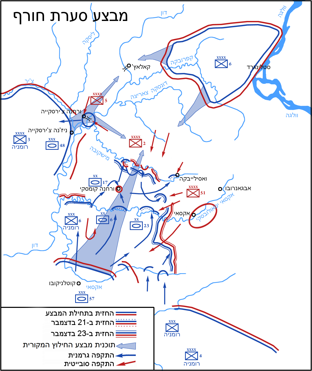 מבצע סערת חורף (תמונה משופצת על פי בקשה). יש גרסאות קודמות לא שלי